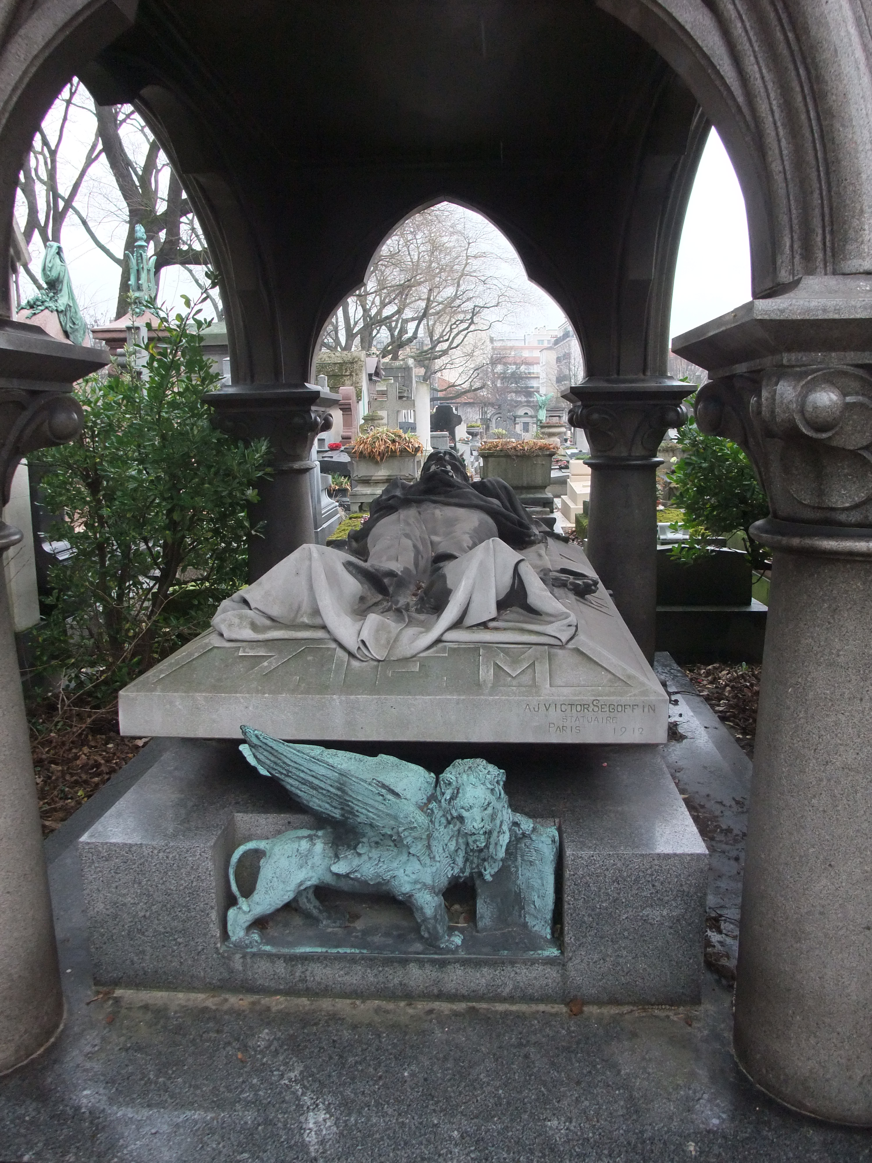 tombe de Ziem au Père Lachaise, Paris